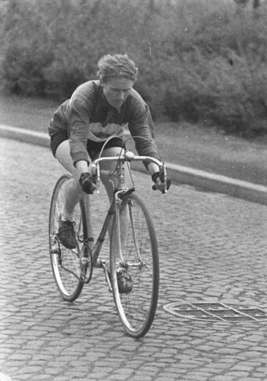 Elfriede Vey Zentralbild Brix (Erfurt) 12.5.1956 Erstes Frauen-Radrennen in Erfurt Als Vorrennen zur Fahrt "Rund um die Hainleite" am 10.5.1956, fand ein Rennen "Rund um das Gewerkschaftshaus" in Erfurt statt. In der Klasse 5 starteten die Frauen. Nach einer siegreichen Alleinfahrt erreichte die 34jährige Elfriede Vey (BSG Einheit Freiberg) das Ziel in 44-31,5 Min. UBz: Elfriede Vey auf der Strecke.